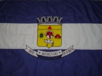 Bandeira da cidade de Araçuaí